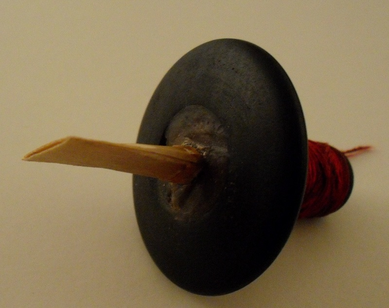 Doppelrohrblatt im Mundstück eines Piffero